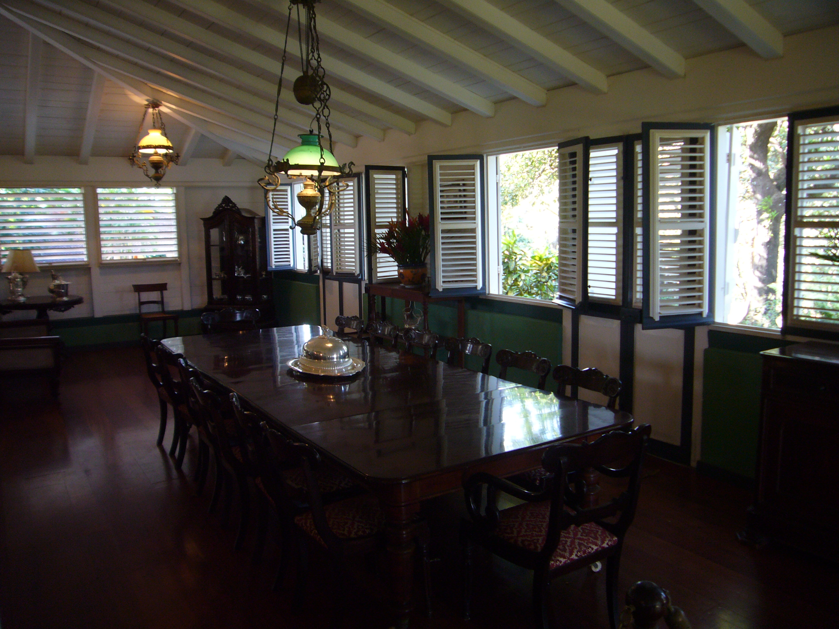 Habitation Clément inside, Martinique